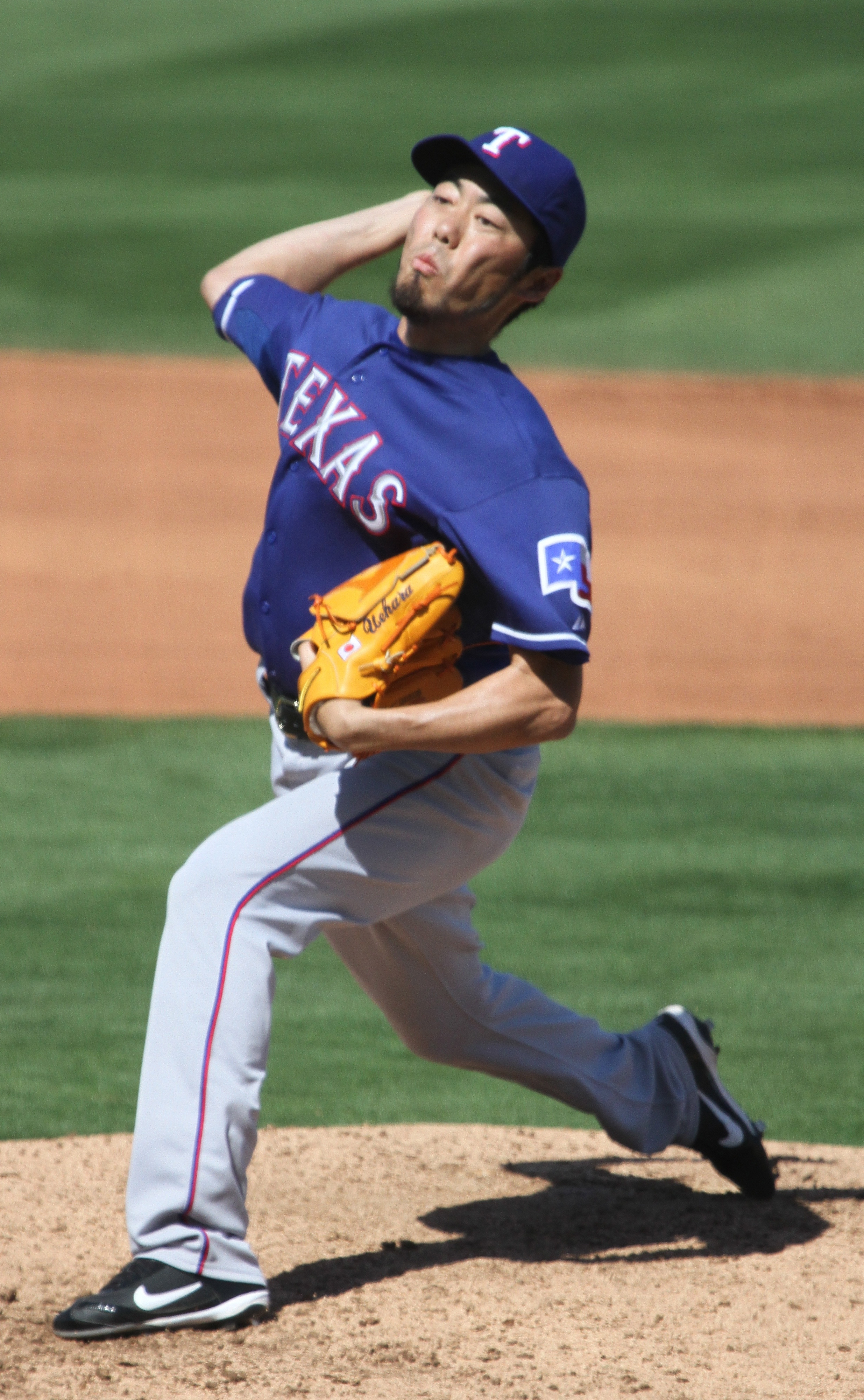 Koji Uehara